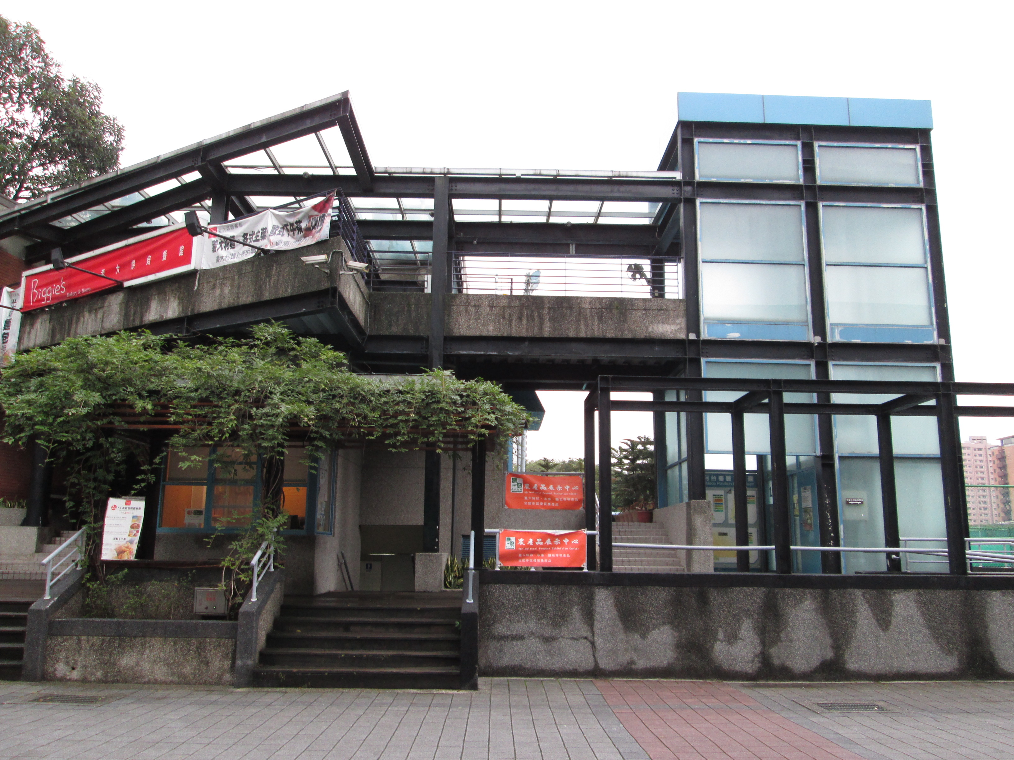 中文（台灣）: 國立臺灣大學新月台蒲葵道側。